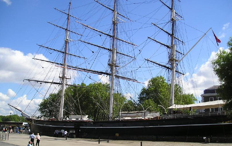 Le Cutty Sark en cale sèche à Greenwich